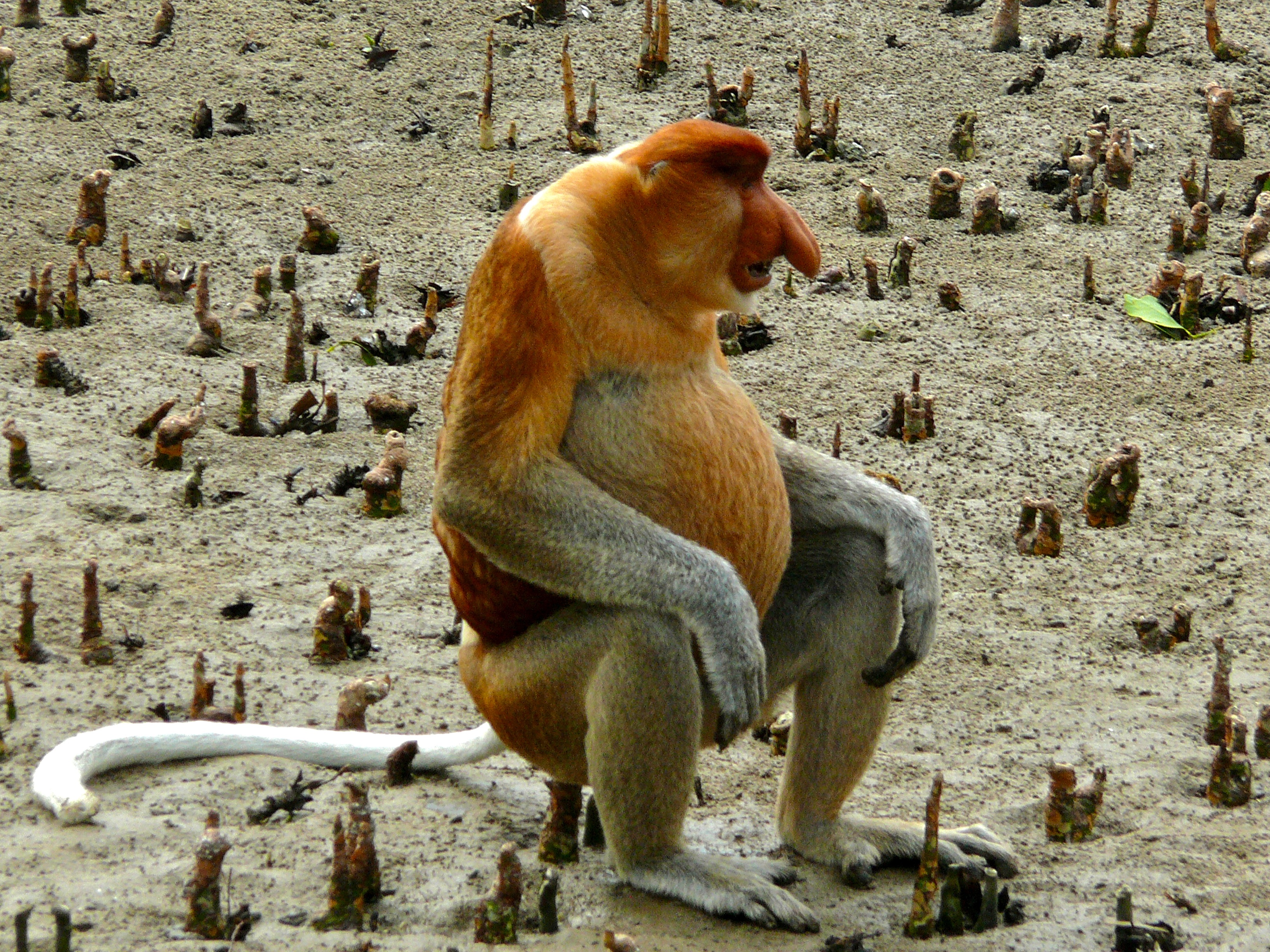 Bako NP Sarawak